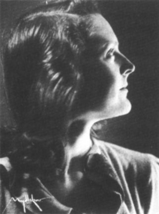 Anna Maslocha